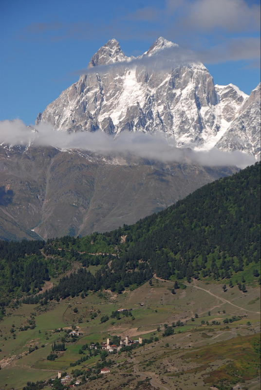 Ushba